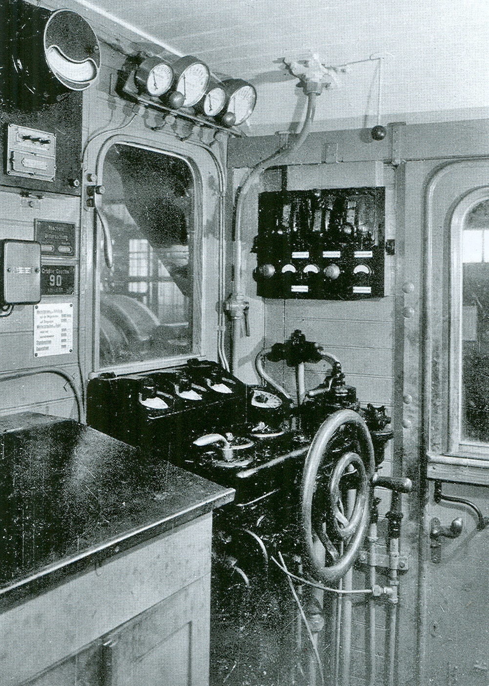 Werkfoto von BEW von dem Führerstand der EP 236